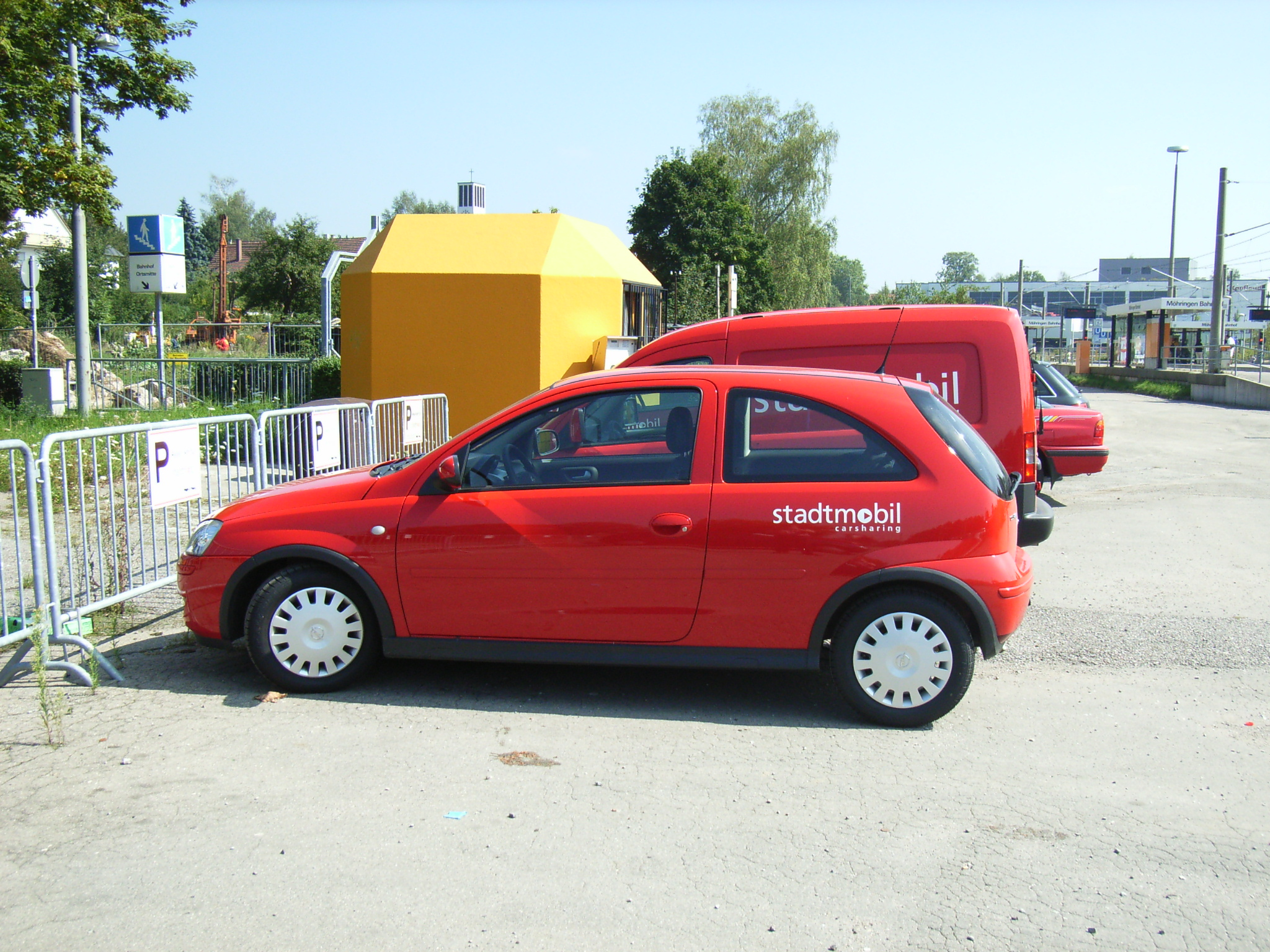 Stadtmobil (Carsharing) Auto Corsa, Stuttgart-Möhringen, Fotograf: Dirk Grützmacher